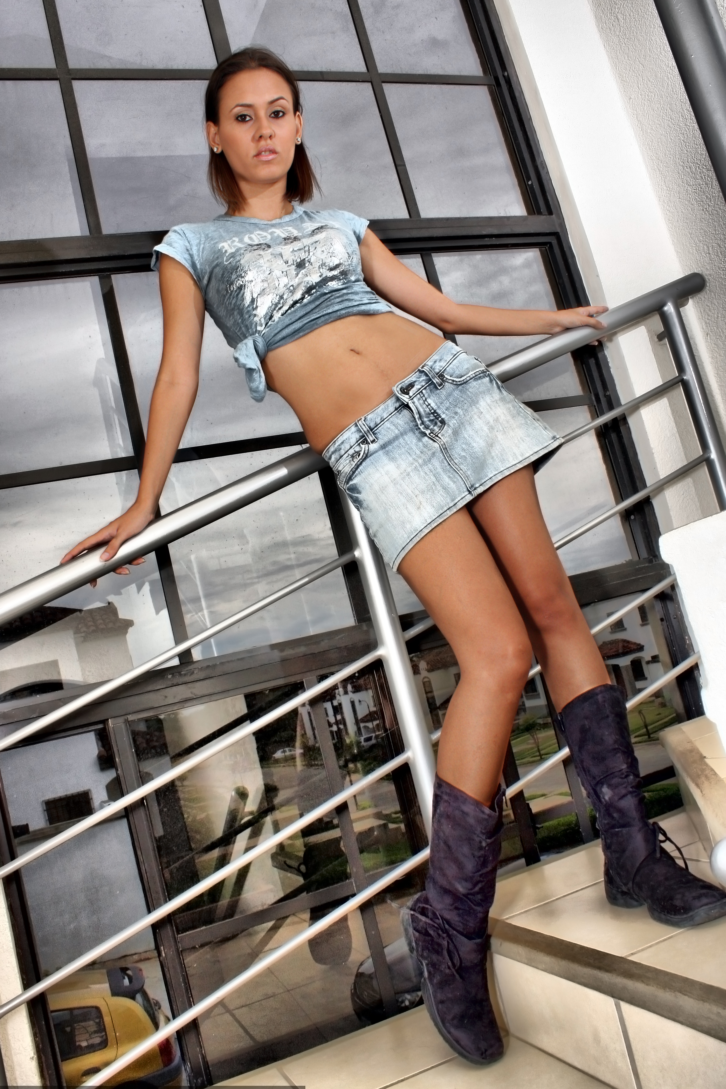 Iva Grijalva Pashova.